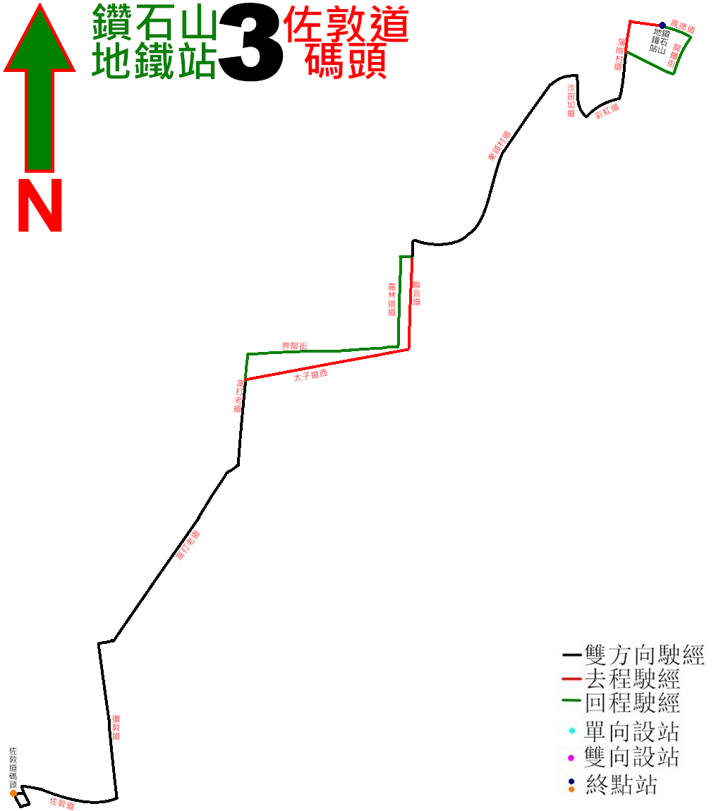 中文（香港）: 九巴3路公車取消前的走線圖